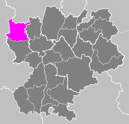 Maps of arrondissements and cantons of France: Arrondissement de Roanne.PNG (Région Rhône-Alpes)